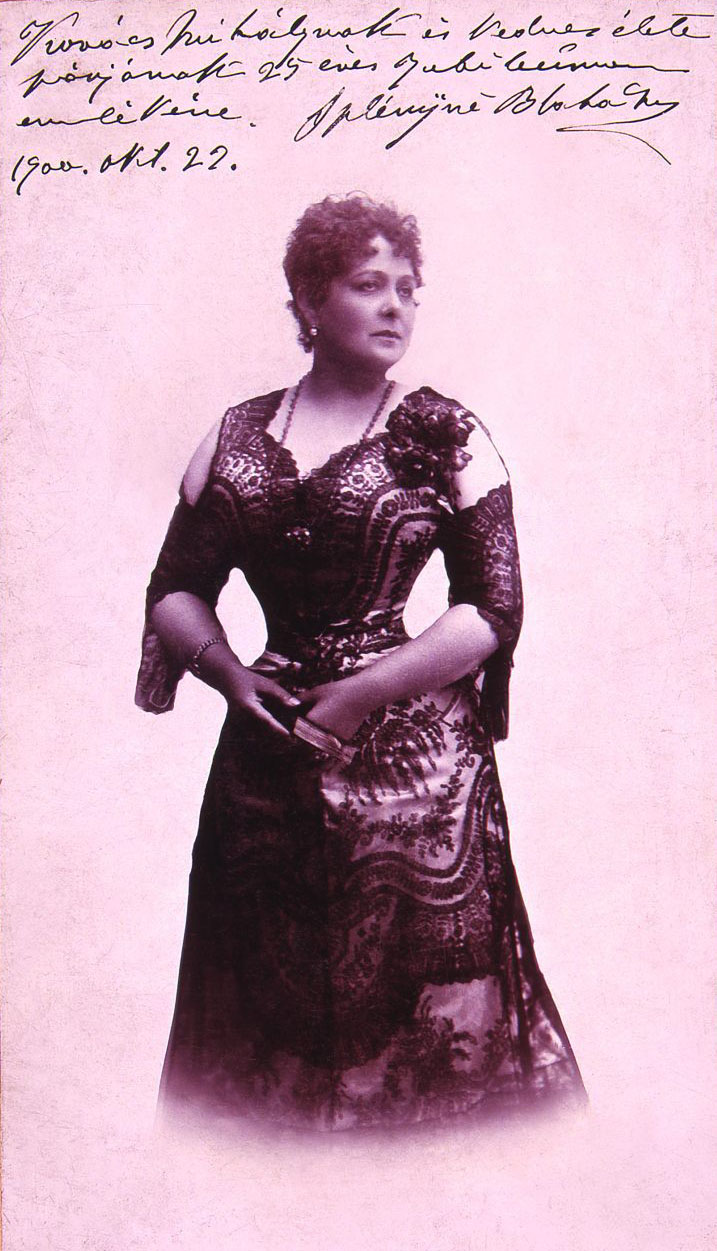 Blaha Lujza népszínházi tagsága 25 éves jubileumán (1900. október 22.). Kovács Mihálynak és feleségének dedikálva National Széchényi Library LocationBudapestCoordinates47° 29′ 53.34″ N, 19° 02′ 14.4″ E Established1802Web page control : Q1063819 VIAF: 157919295 ISNI: 0000 0001 1781 8798 ULAN: 500306655 NLA: 35722893 GND: 1007496-X institution QS:P195,Q1063819 Accession number: Színháztörténeti Tár, 1952/9654